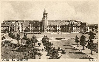 Gare de La Rochelle, France.